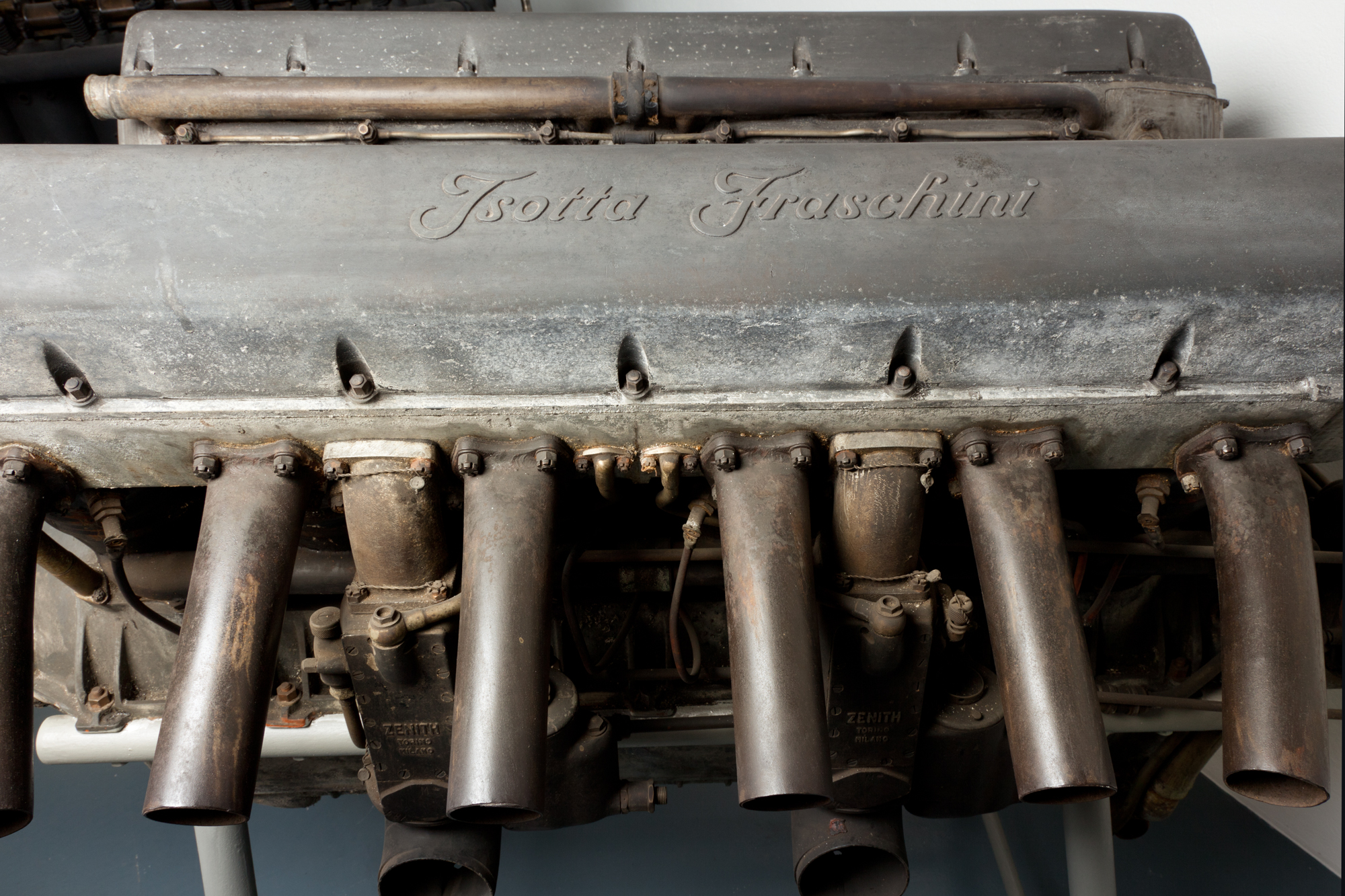 Motore Isotta Fraschini Asso 500 esposto al Museo nazionale della scienza e della tecnologia Leonardo da Vinci di Milano.